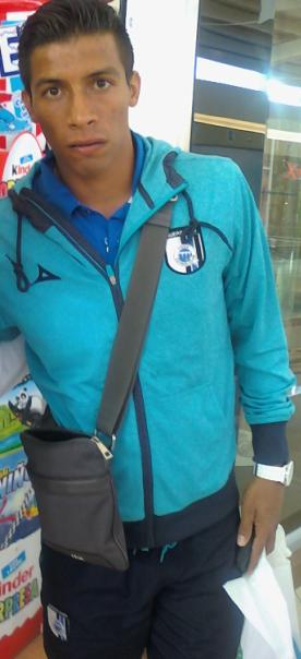 El jugador de fútbol mexicano Ángel Baltazar Sepúlveda en Zacatecas.